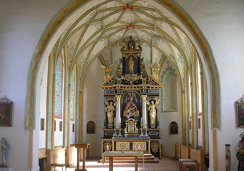 Wallfahrtskirche St. Willibald (Jesenwang, Landkreis Fürstenfeldbruck, Oberbayern). Blick in den Chor. Eigene Aufnahme, Okt. 2006 / Pilgrimage church St. Willibald at Jesenwang (Upper Bavaria, Germany). View into the choir. Own photo, Oct. 2006